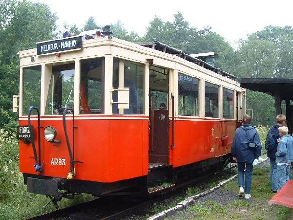 Autorail AR 93 du TTA (ex SNCV), prise à la station de FORGE-A-LA PLEZ